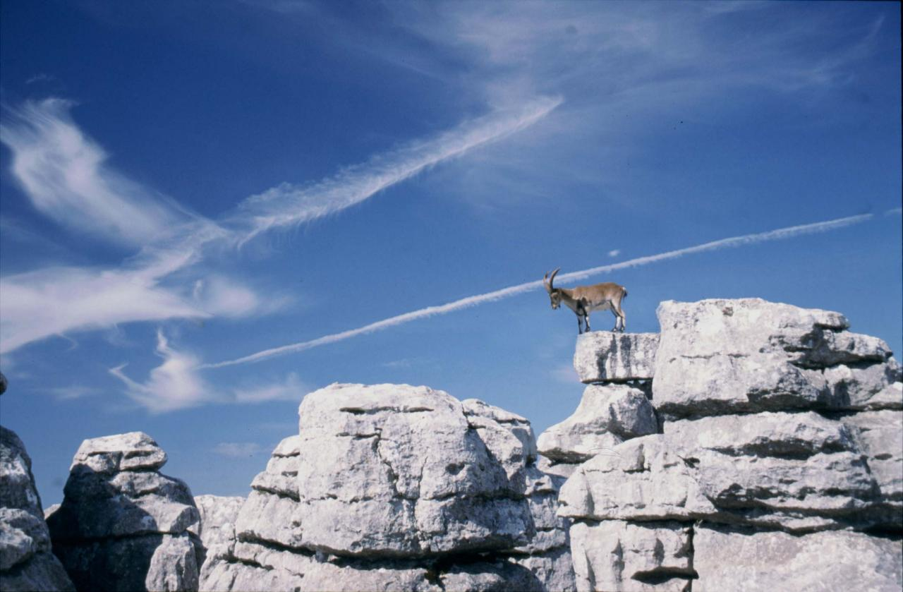 Cabra montés en El Torcl, Antequera, España.